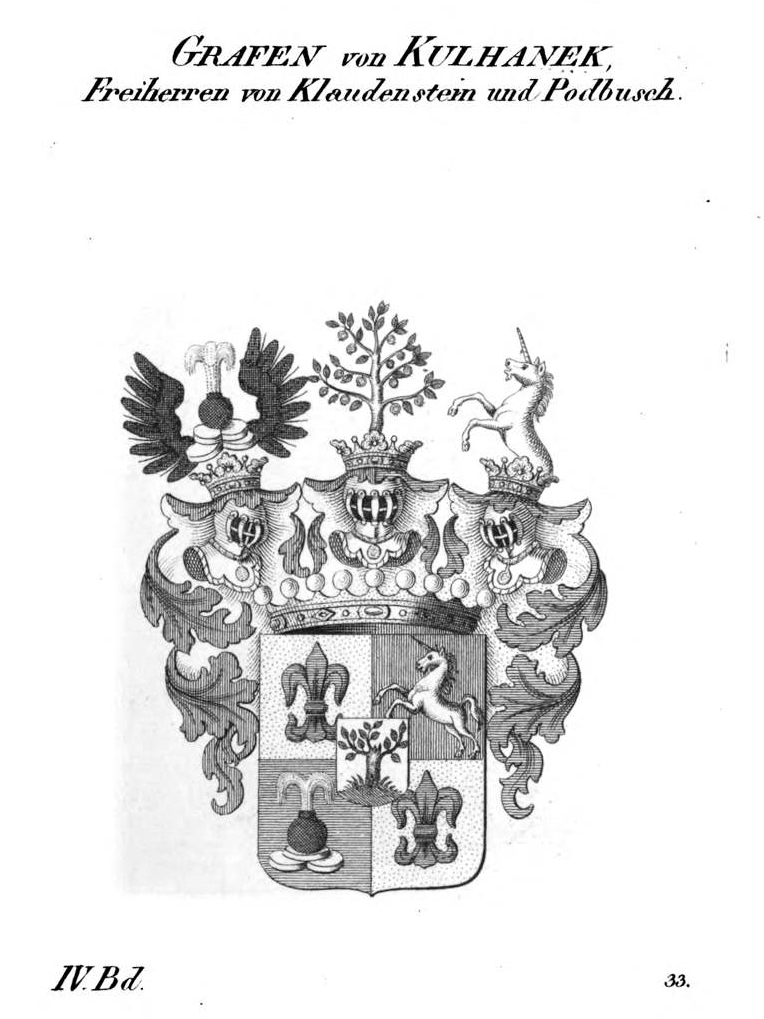 Wappen Kulhanek Klaudenstein Podbusch - Tyroff AT.jpg